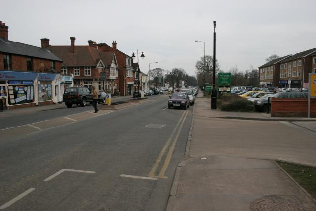 Изглед от град Аскът